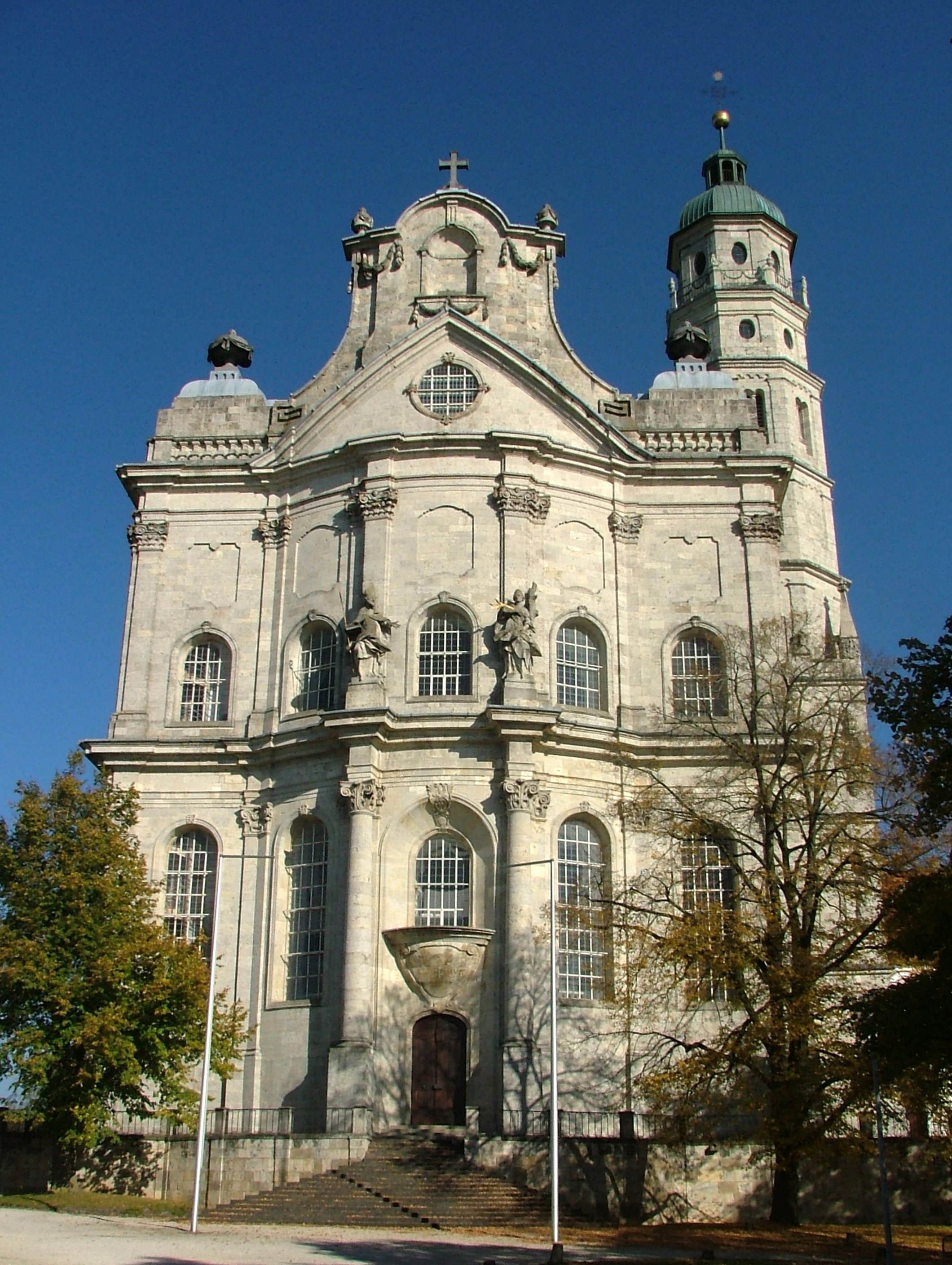 Neresheim